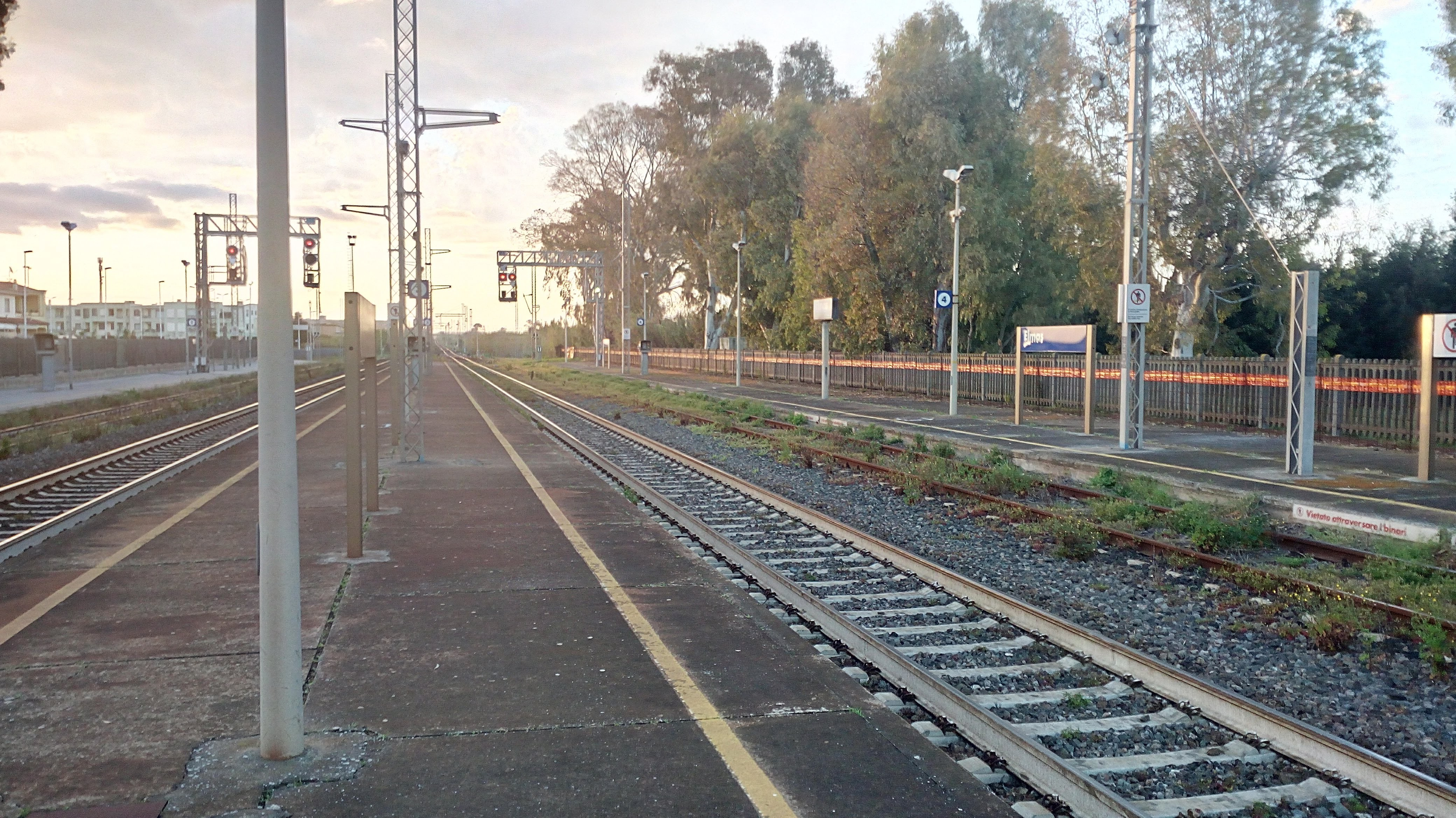 I binari 3-4 della stazione ferroviaria di Elmas.